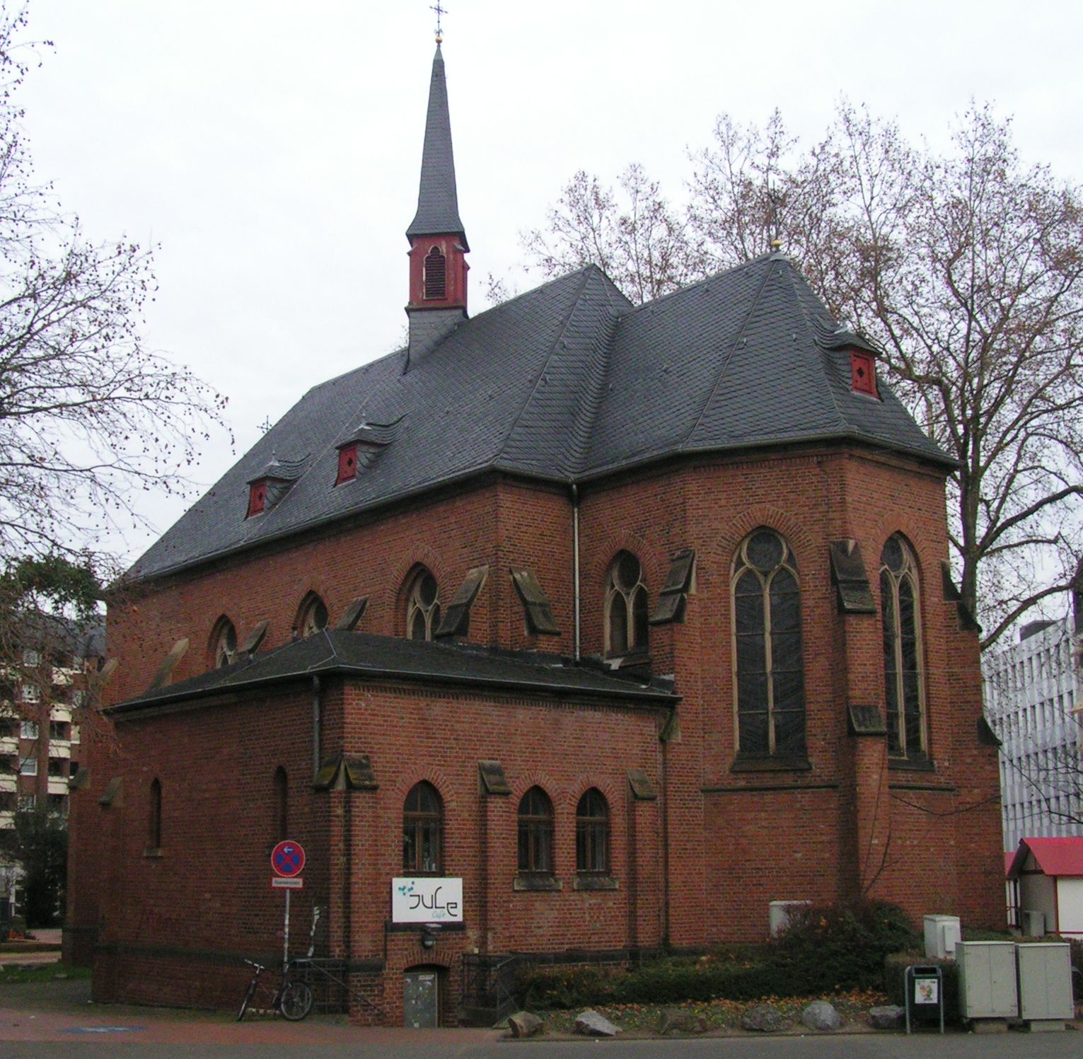 Aloysius-Kapelle in Leverkusen-Opladen. Die Kapelle ist der letzte Überrest des "Aloysianums", eines bis 1938 bestehenden katholischen Gymnasiums. Das Gebäude des Aloysianums wurde bis 1974 als Rathaus der Stadt Opladen genutzt und 1975 von der Stadt Leverkusen - bis auf die Kapelle - abgerissen.